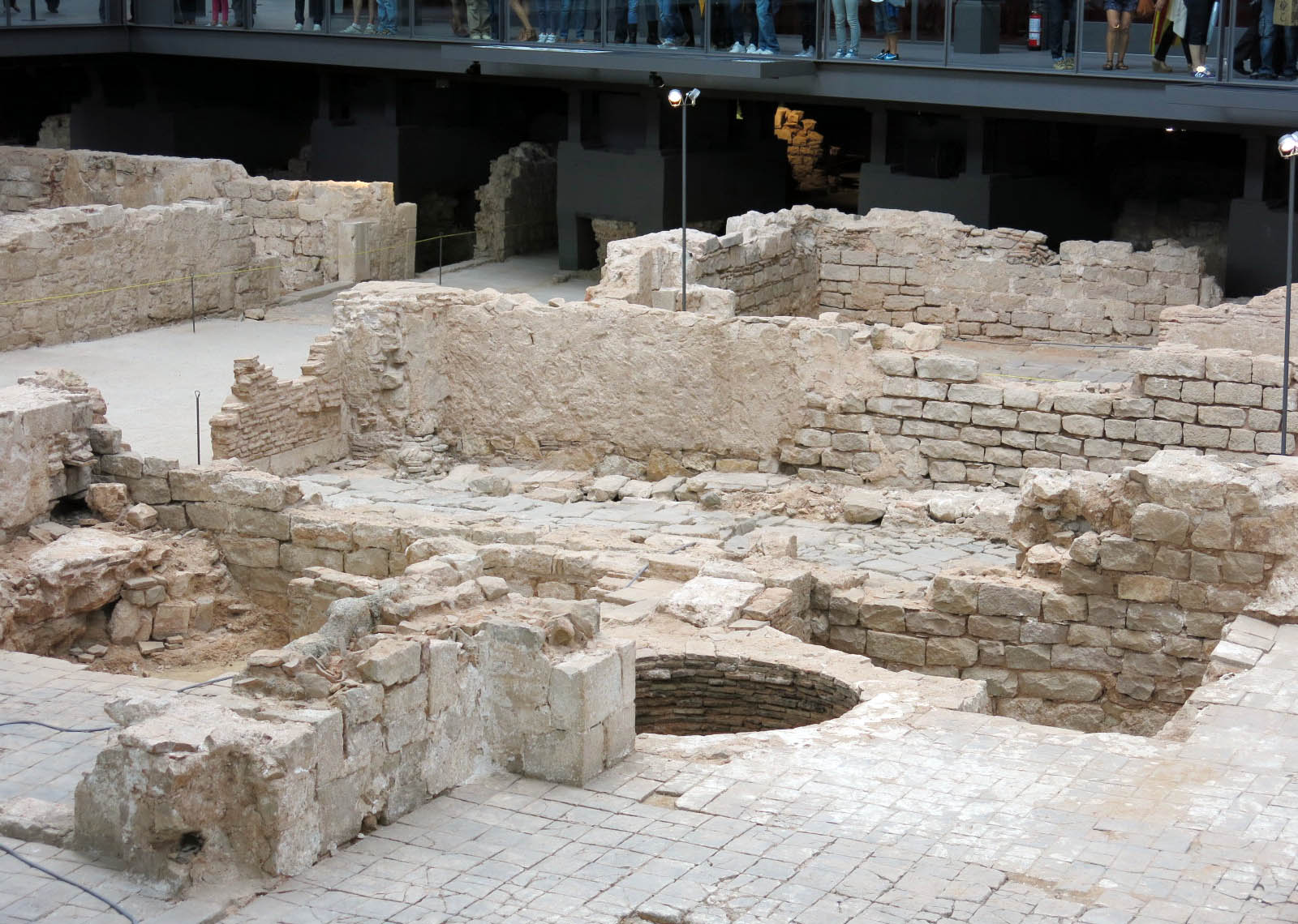 Mercat del Born (Barcelona). Cases Boxadors (N.46) Object location41° 23′ 08.76″ N, 2° 11′ 01.54″ E